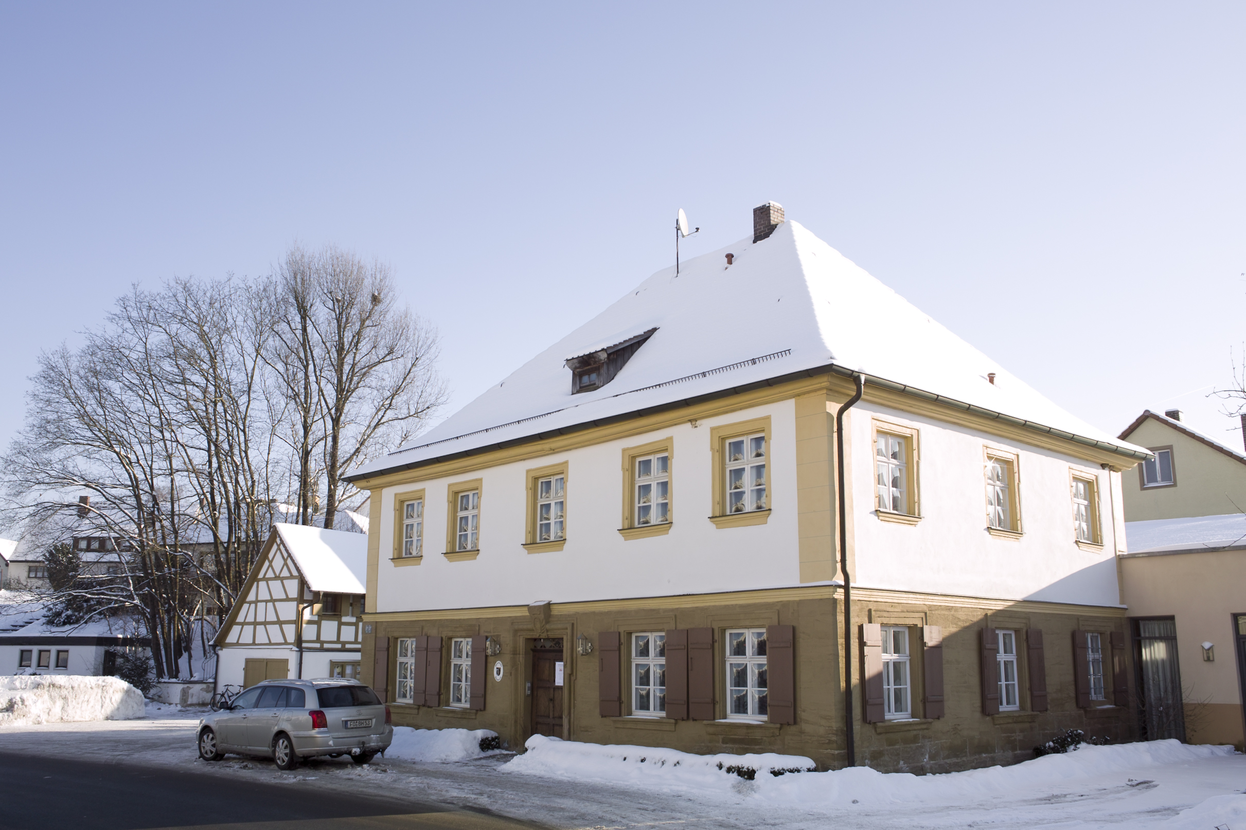 Rathaus von Kunreuth im Dezember 2010